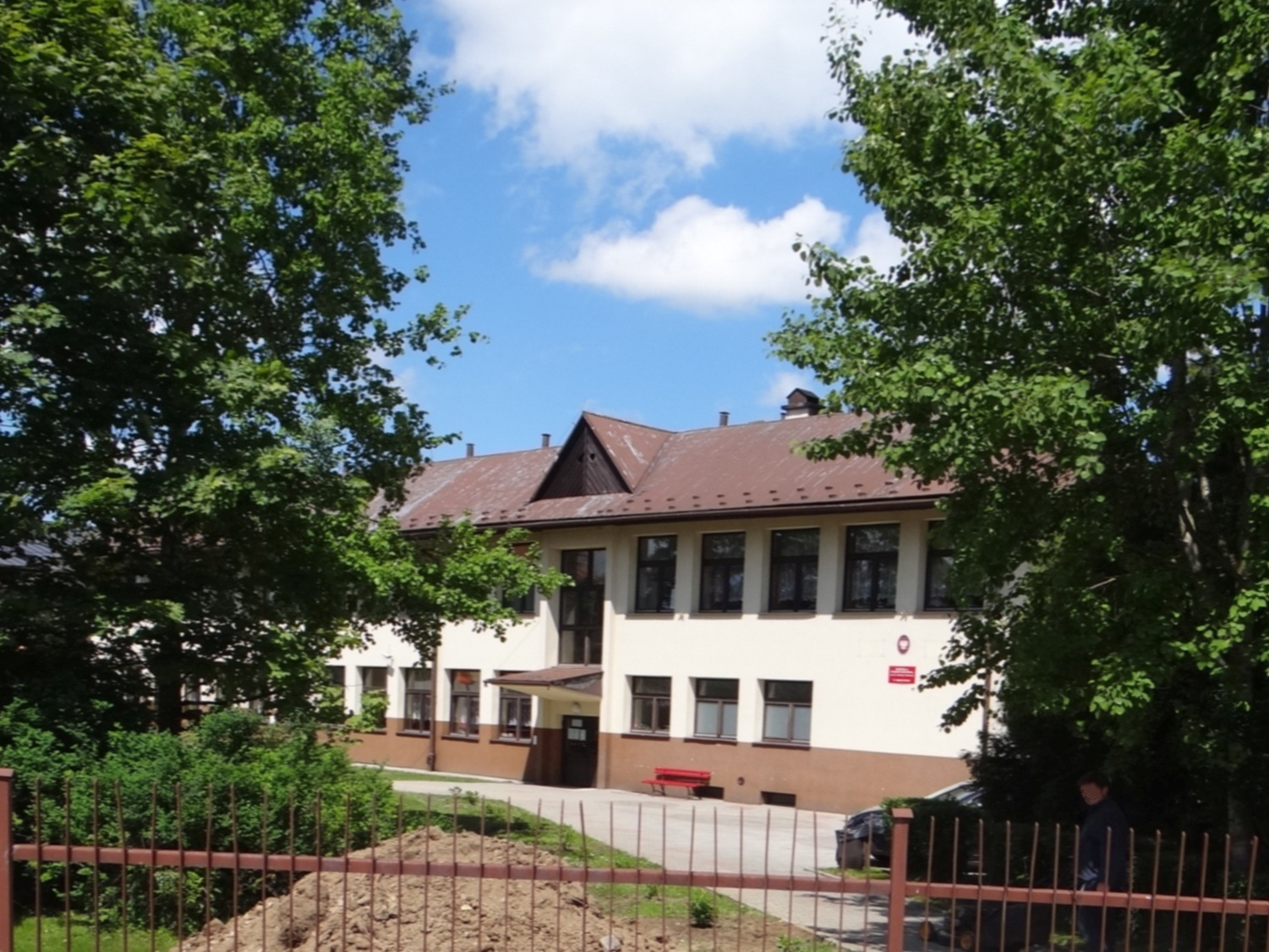 Skrzypne